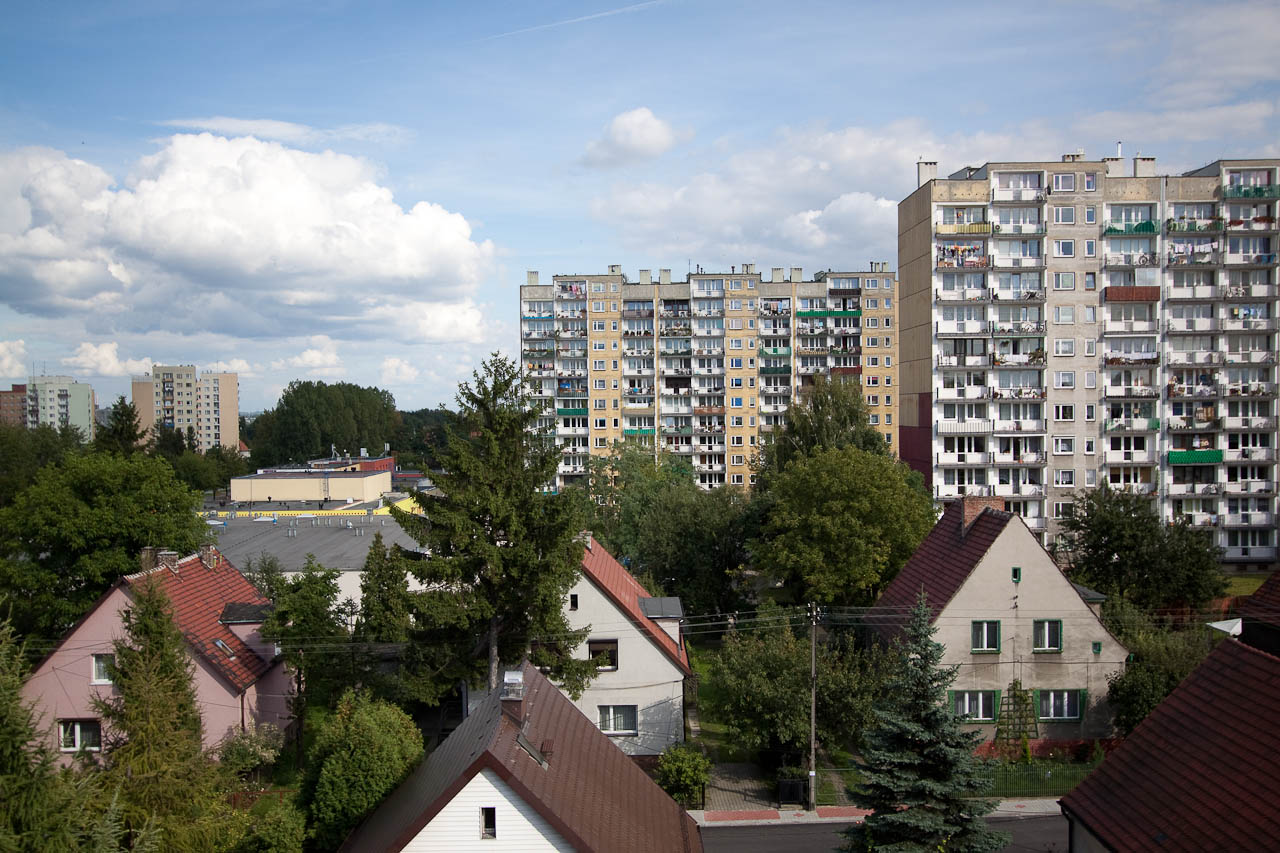 Domki przy ul. Dzierżonia, dalej bloki przy ul. Junaków i Kusocińskiego. Gliwice, dzielnica Trynek